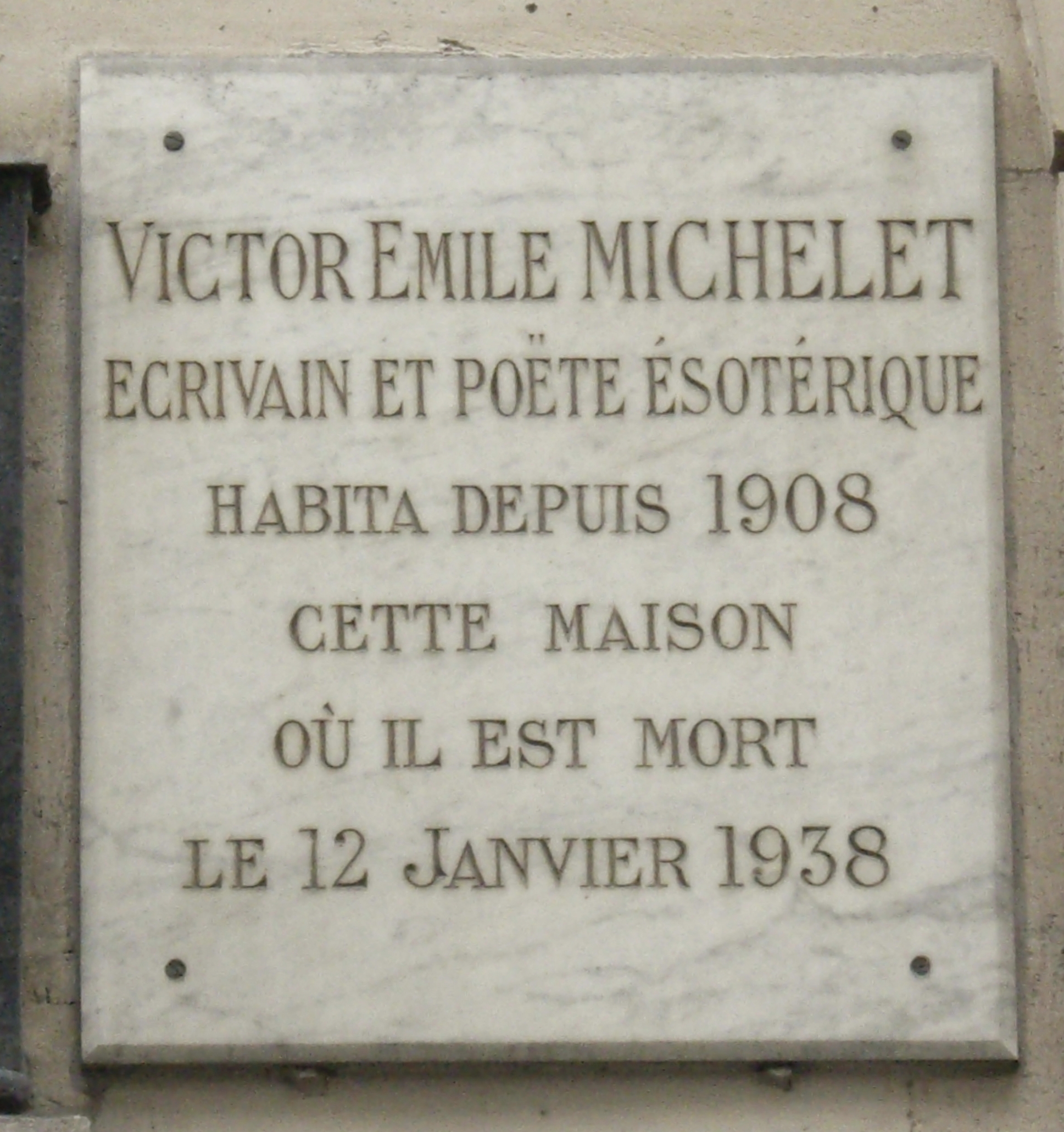 Plaque apposée au n° 26 de la rue Monsieur-le-Prince, Paris 6e. « Victor-Émile Michelet, écrivain et poète ésotérique, habita depuis 1908 cette maison où il est mort le 12 janvier 1938. »